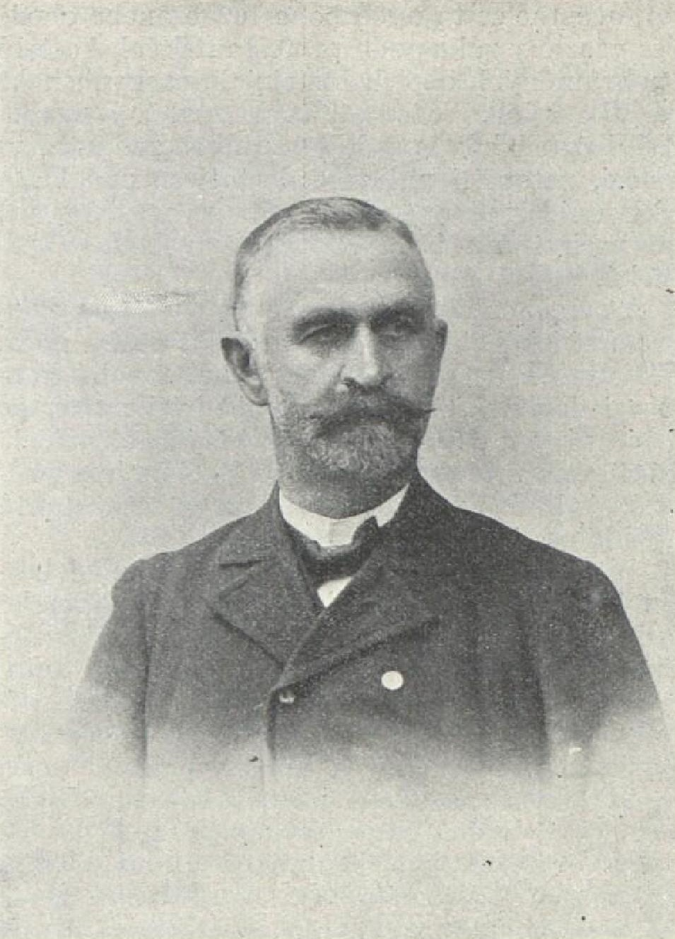 Jan Pleva (1843-1929), rakouský a český politik